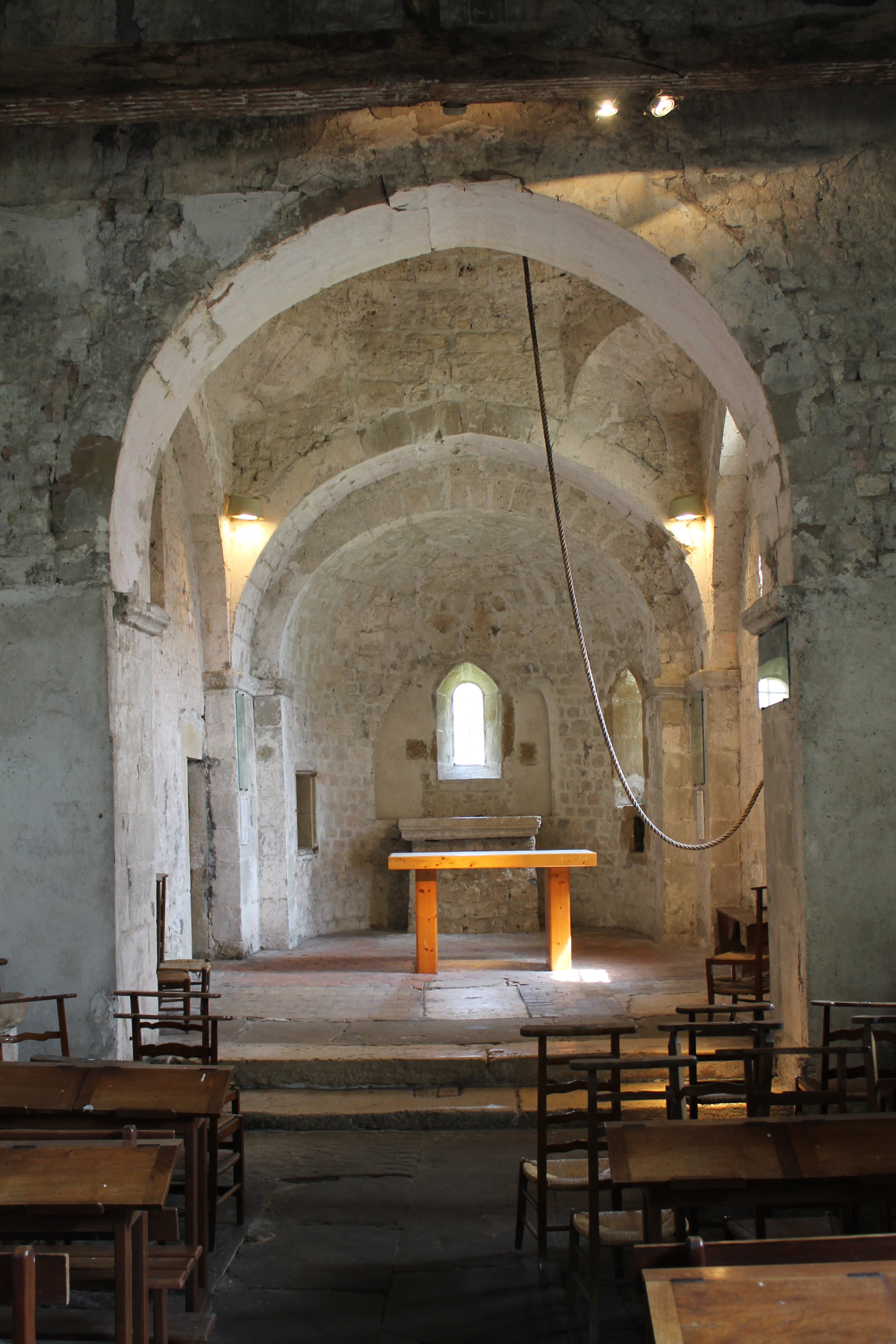 Intérieur de l'église romane St Didier d'Aoste (Isère), du XIIe siècle.